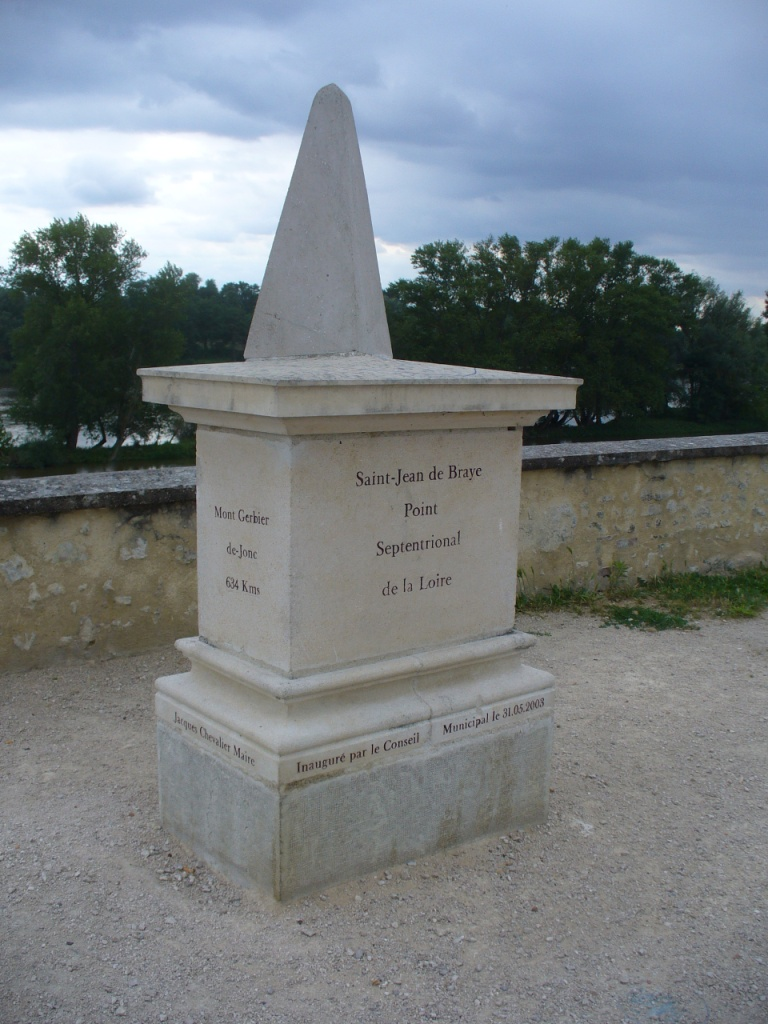 Point septentrional de la Loire à Saint-Jean-de-Braye (Loiret)